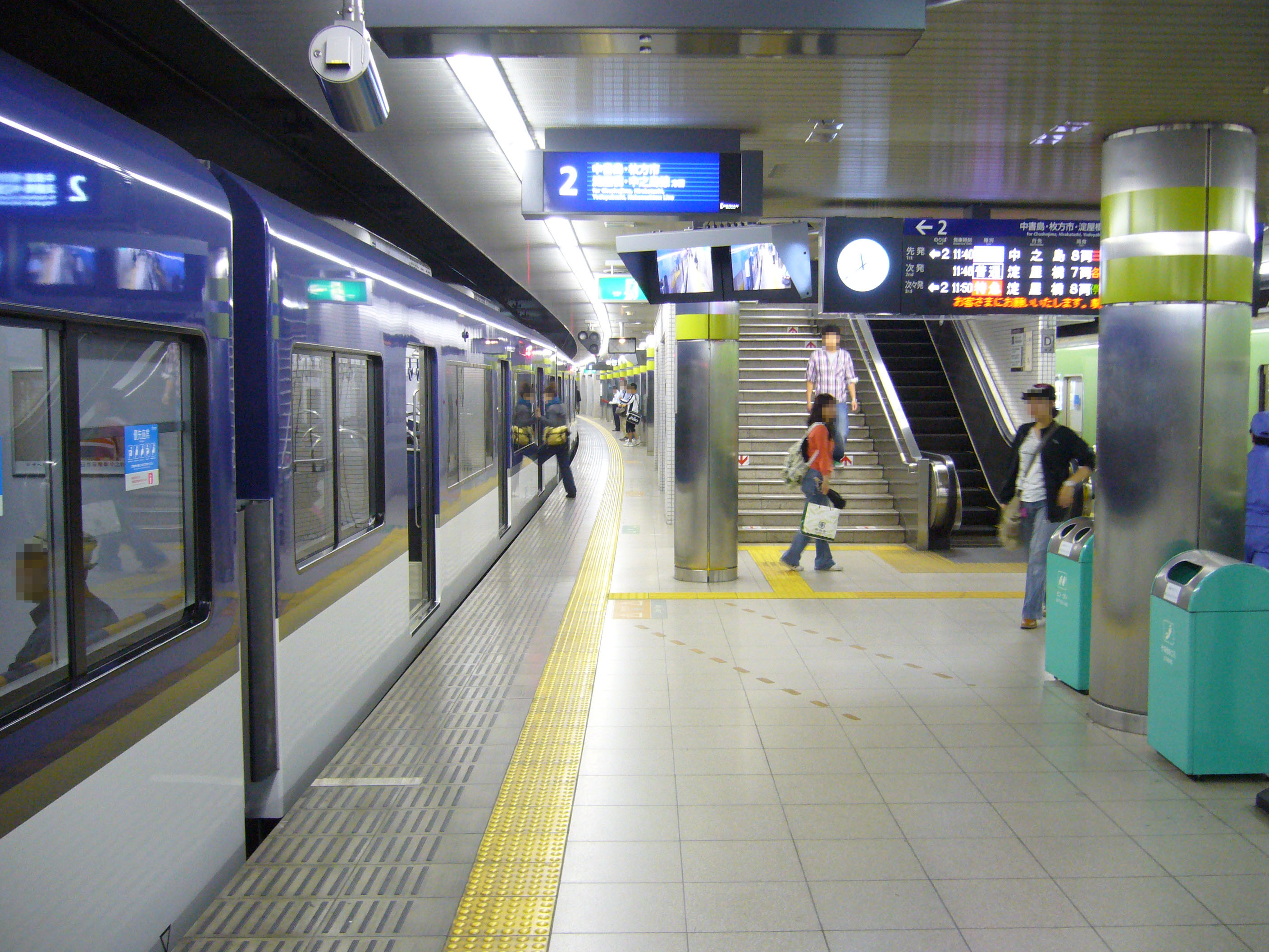 京都市左京区にある京阪電気鉄道京阪鴨東線出町柳駅の地下ホーム。1面2線のホームを持つ。2007年の画像と比べると、発車標がパタパタ式からLED式に交換されていることなどがわかる。停車しているのは京阪3000系電車の中之島駅行き快速急行。2008年10月19日に投稿者が撮影。